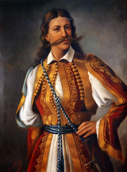 griechischer Freiheitskämpfer, 1821